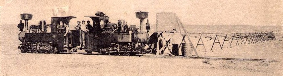 Nonidas (D. S. W. Afrika) Wasserleitung aus dem Swakop